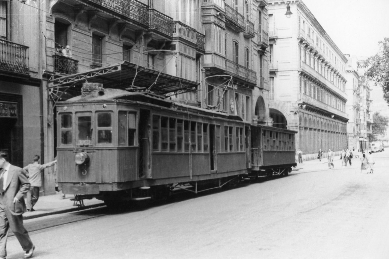 Ferrocarril de S.Sebastian a la frontera, Calle Peñaflorida foto G. Massino